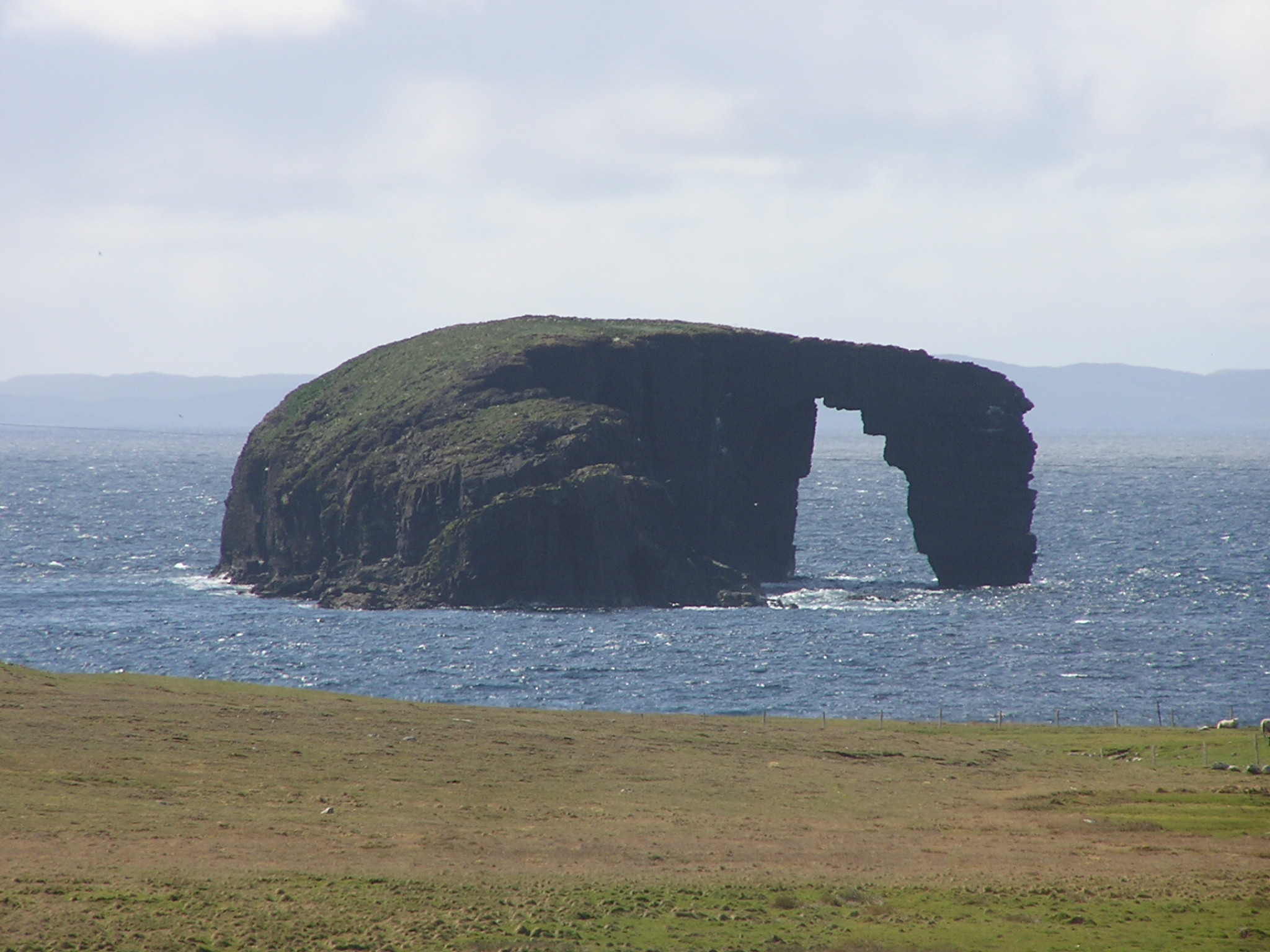 Dore Holm vor Mainland, Shetlands